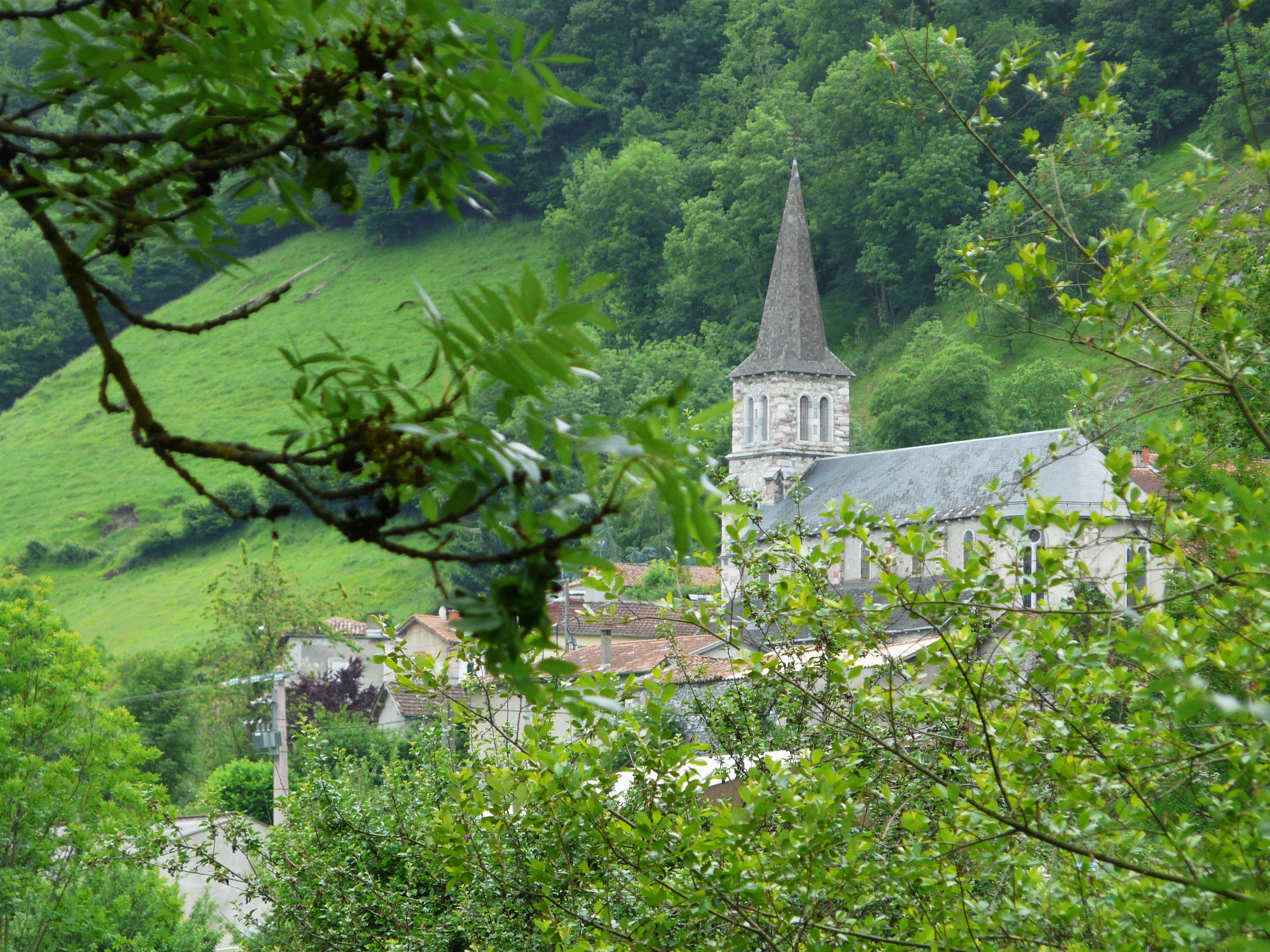 L'église et le village de Sost vus du nord-est, Hautes-Pyrénées, France.